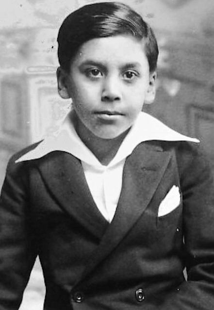 El niño pianista Vicente Bianchi Alarcón en 1934. Vicente Bianchi Alarcón (Ñuñoa, Región Metropolitana de Santiago; 27 de enero de 1920-24 de septiembre de 20181​) fue un destacado compositor, pianista y director de orquesta y coros y radiodifusor chileno. Obtuvo el Premio Nacional de Artes Musicales de Chile en 2016. Su obra destaca por llevar a la música los poemas de Pablo Neruda, la musicalización de misas y eventos litúrgicos, como la Misa a la chilena (compuesta en 1964 y estrenada en 1965) y el Te Deum (1970-2000), arreglos orquestales, como Música para la historia de Chile y Canto a Bernardo O’Higgins, y arreglos para películas, entre otras.